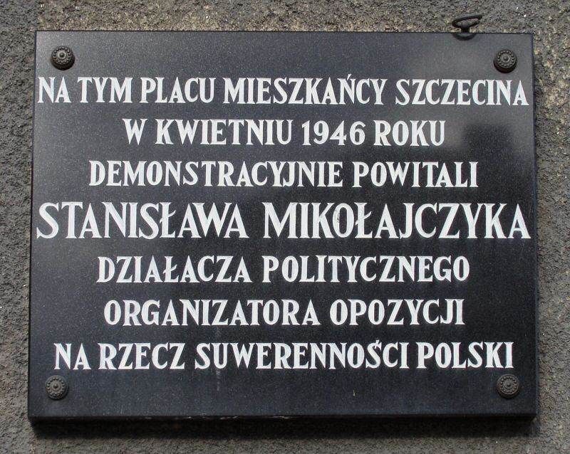 Tablica na gmachu Urzędu Miejskiego w Szczecinie, poświęcona Stanisławowi Mikołajczykowi